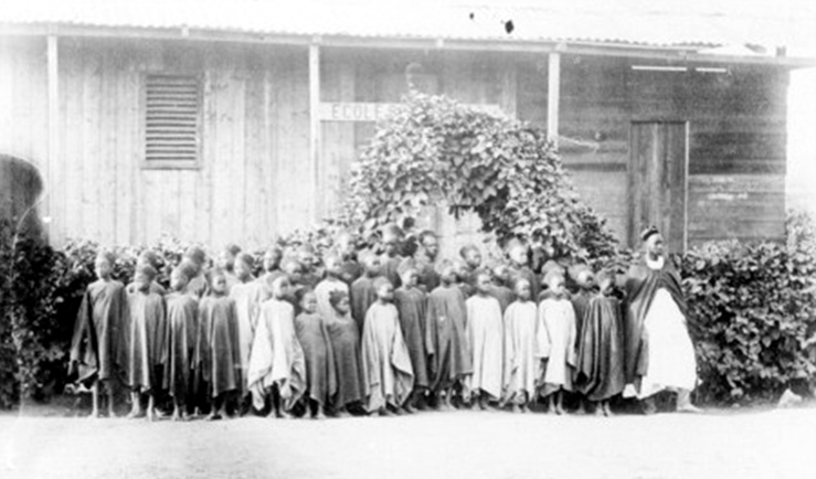 Enfants de l'Ecole des otages, à Kayes, créée par le colonel Galliéni (51 phot. du Soudan français, campagne de 1887-1988).